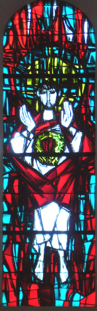 D'Häerz-Jesu-Fenster an der Mëtt vum Chouer an der Kierch vu Leideleng.